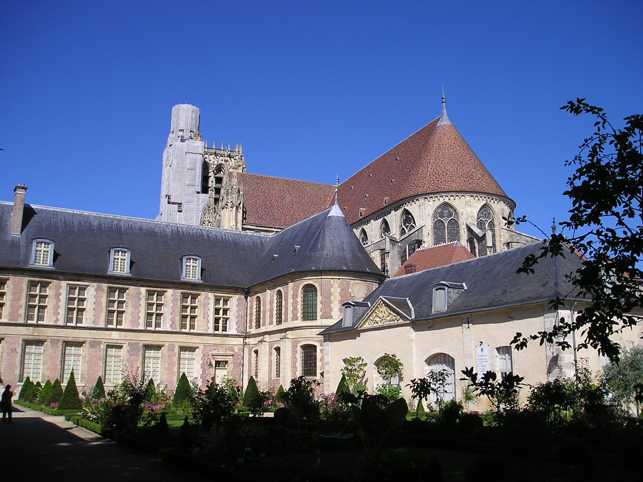 Kathedrale_von_Sens_mit_erzbischöflichem_Palast